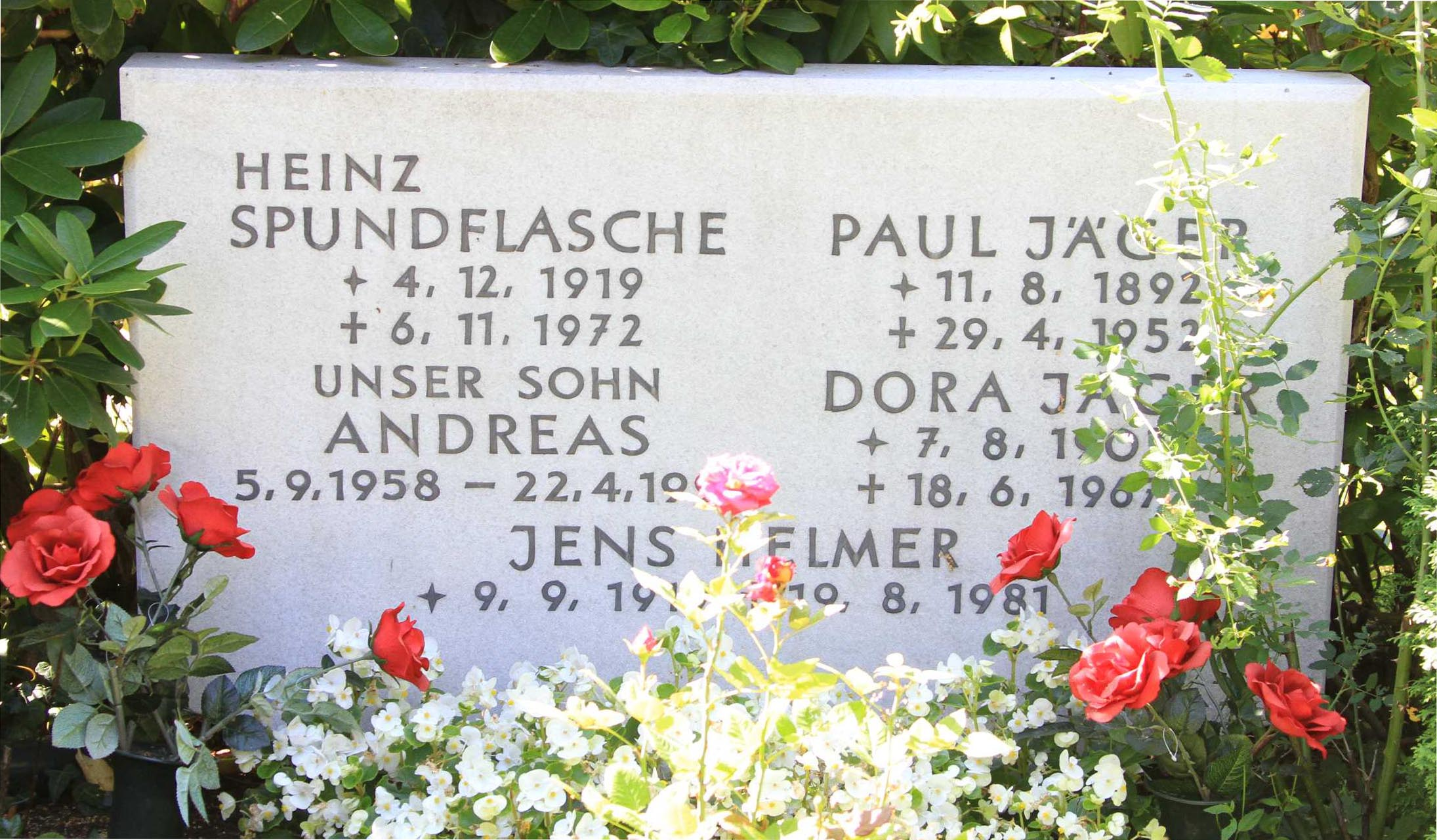 Heinz Spundflasche (* 4. Dezember 1919 in Altona; † 6. November 1972 in Hamburg-Altona) war ein deutscher Fußballspieler. Spundflasche spielte als Halbstürmer und später als Außenläufer zunächst beim Hamburger SV, mit dem er zwischen 1937 und 1952 sechsmal Nordmark-Gaumeister und nach Kriegsende zweimal Meister der britischen Besatzungszone wurde. Für den HSV erzielte er in 127 Oberligaspielen 35 Tore.